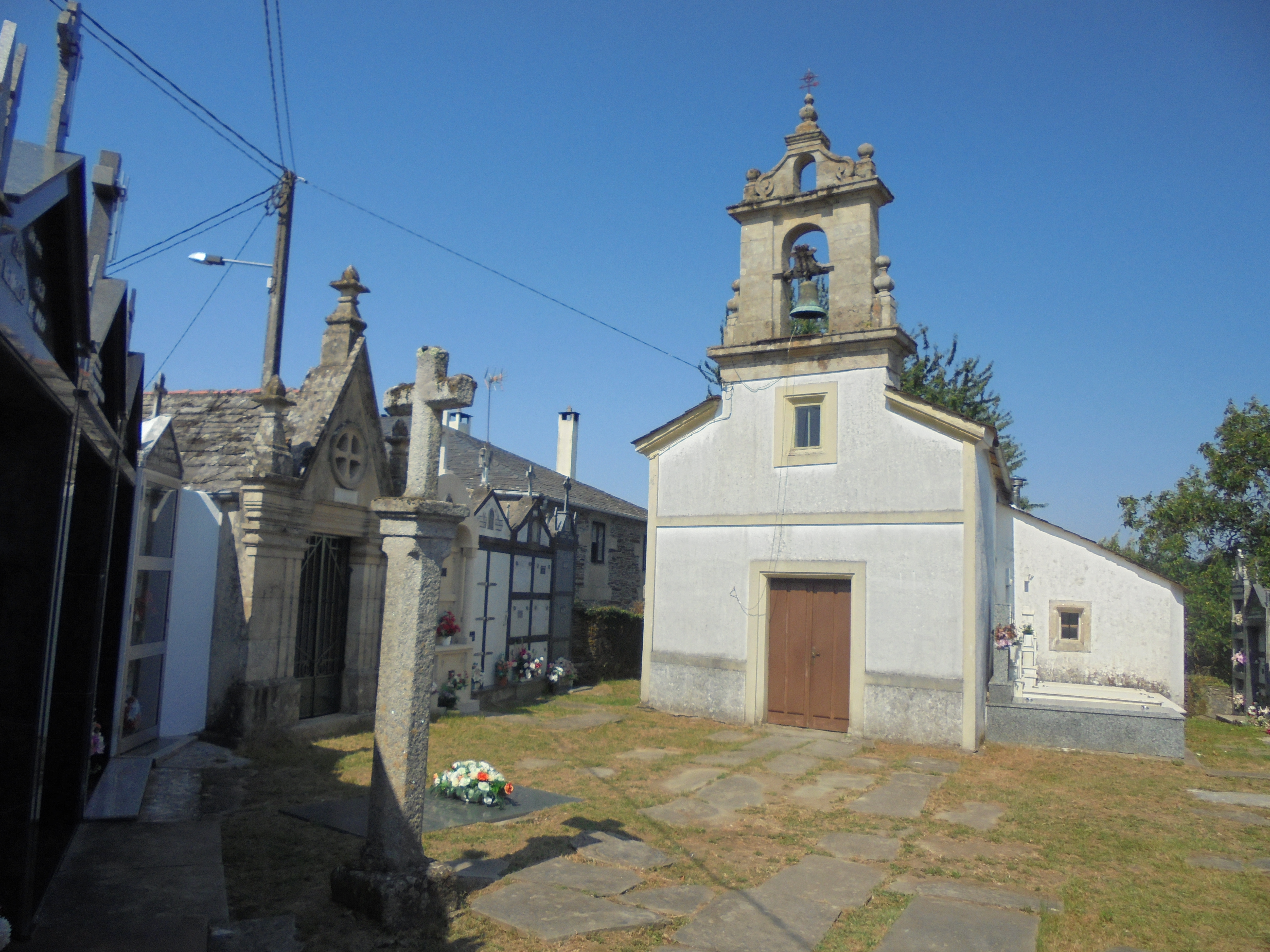 Igrexa parroquial de Santalla de Cuíña ( Lugo)